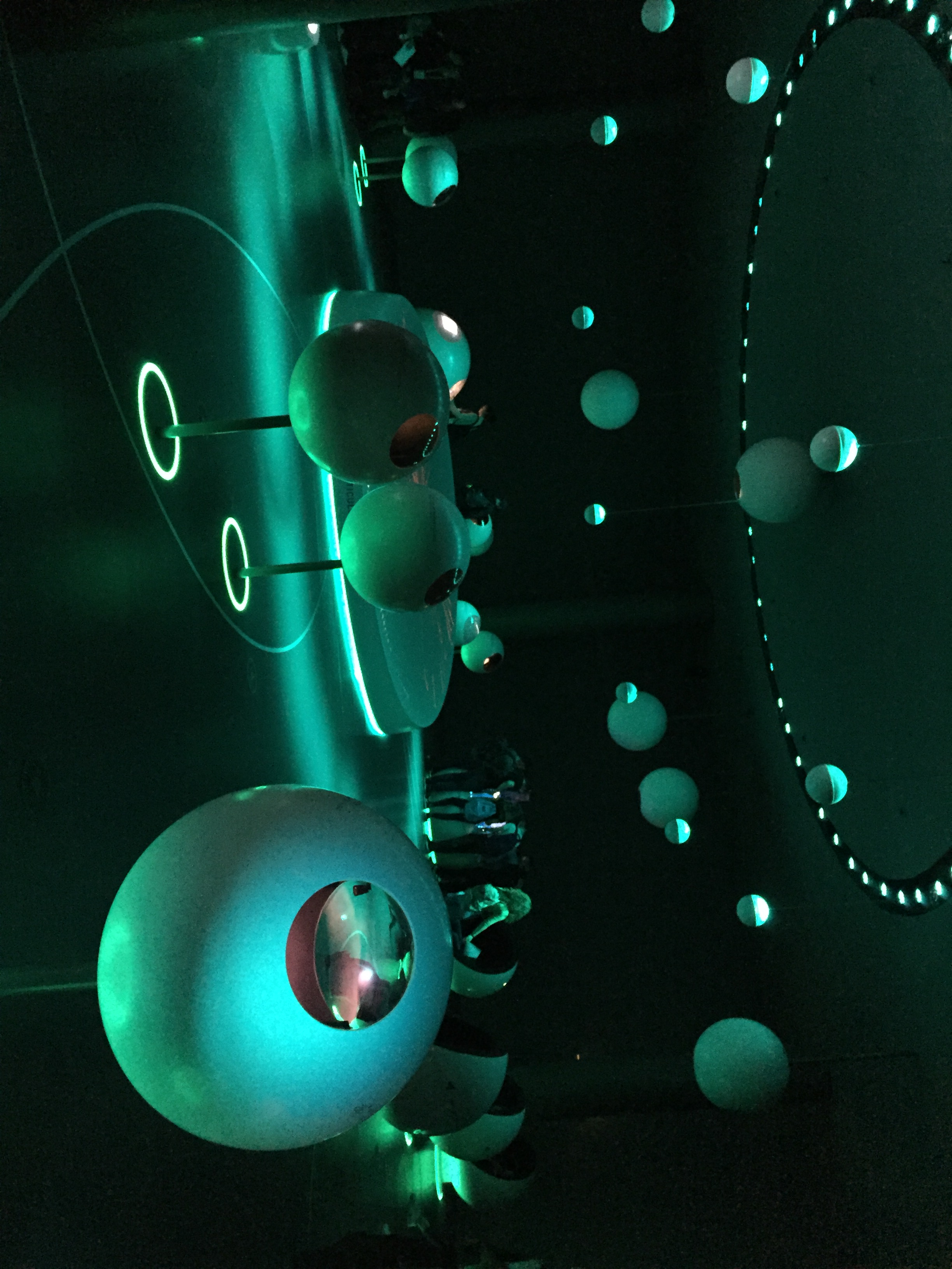 מושבים בהם ניתן לשמוע מידע הקלטות בשפות שונות על אתגרים מדעיים שסרן מנסה לפתור אותן